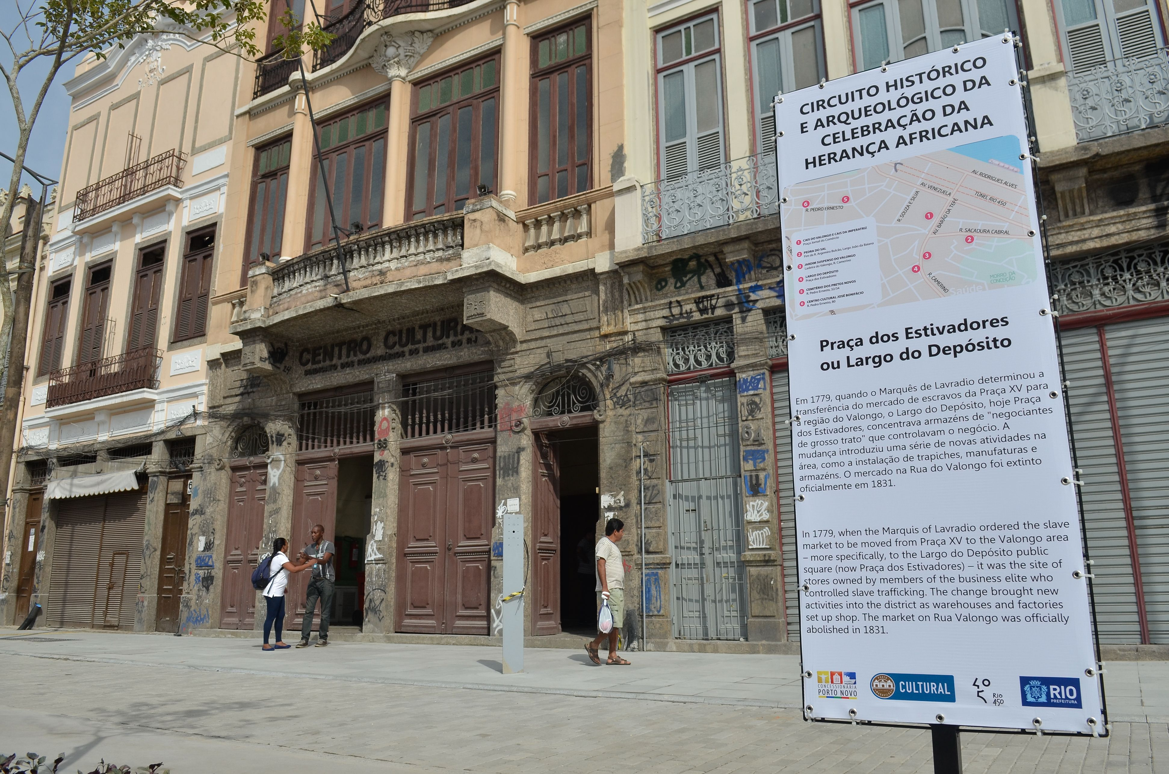 Prefeitura do Rio inaugura o sexto e último ponto do Circuito Histórico e Arqueológico da Celebração da Herança Africana, na Região Portuária, na capital fluminense (Tomaz Silva/Agência Brasil)